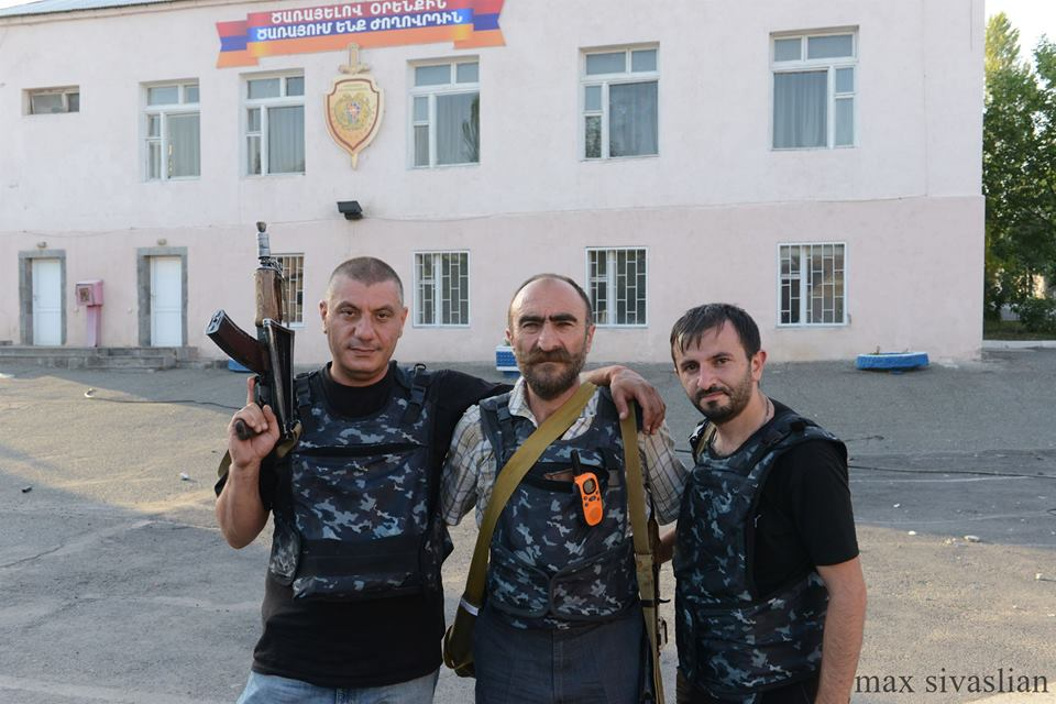 Զինված ապստամբություն Երևանում (2016) Սասնա Ծռեր խմբի անդամներ